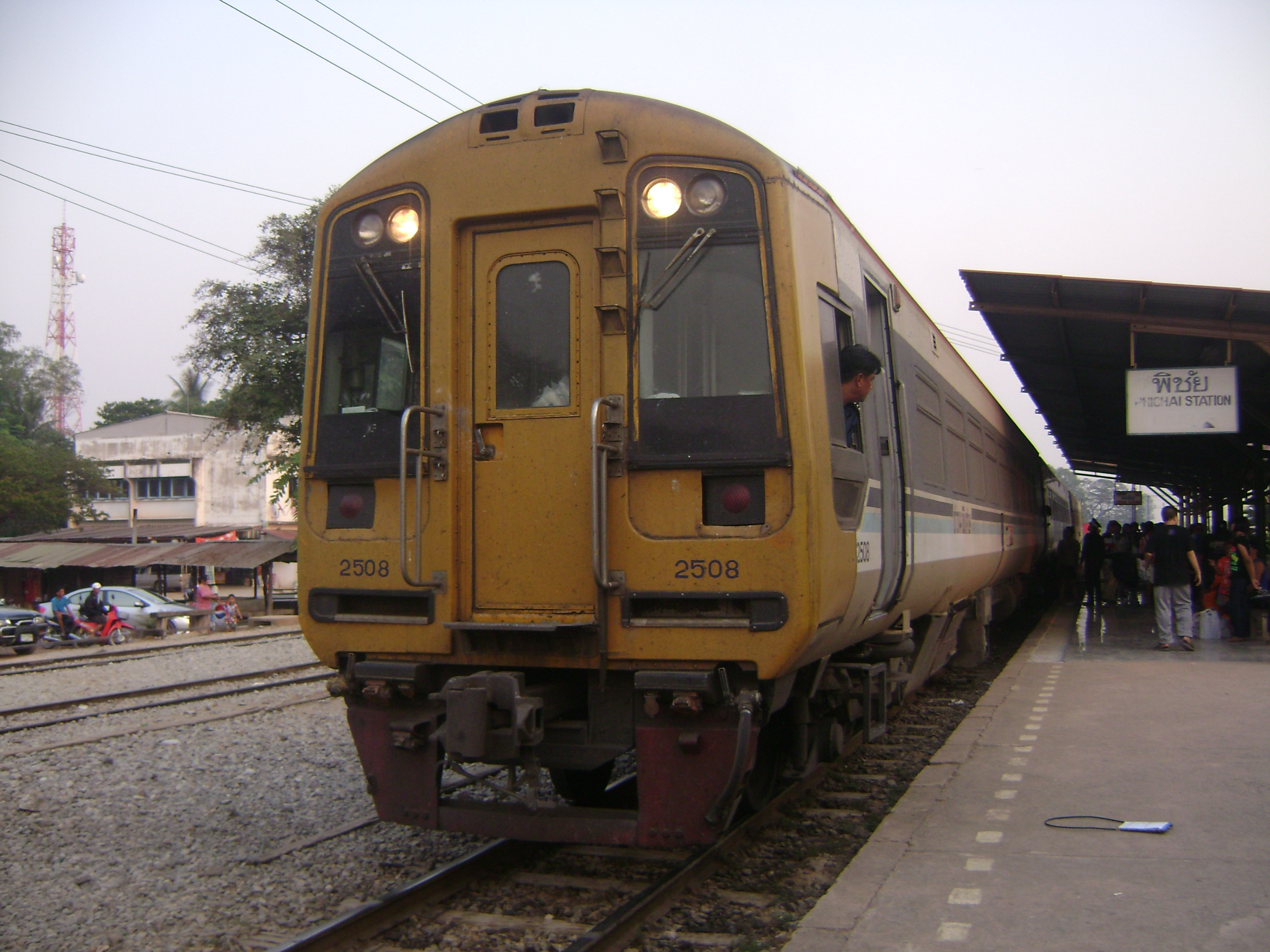 ขบวนรถด่วนพิเศษที่ 3 กรุงเทพ - สวรรคโลก - ศิลาอาสน์ ขณะกำลังหยุดรับส่งผู้โดยสารที่สถานีรถไฟพิชัย